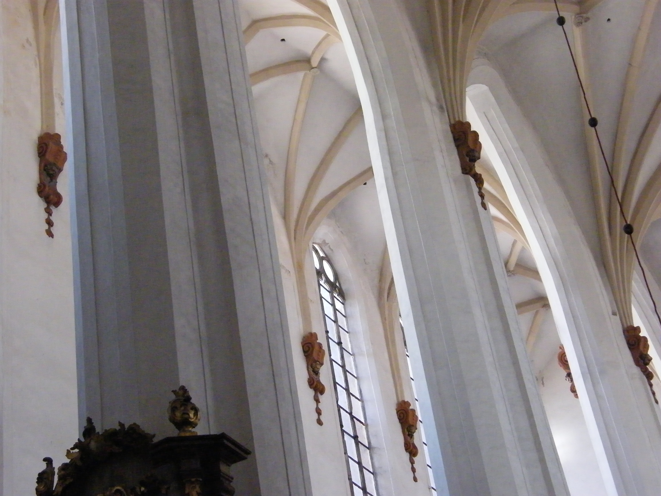 Wrocław, kościół klasztorny augustianów eremitów, ob. par. p.w. śś. Wacława, Doroty i Stani…, 1351-1381, ok. 1400, 3 ćw. XV, 1720-1730, 1892-1899, 1927-1936